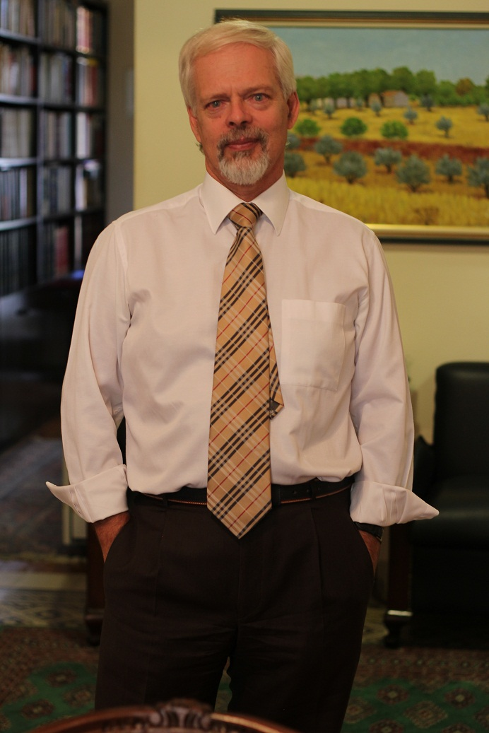 Καθηγητής Εγκληματολογίας και Σωφρονιστικής του Πανεπιστημίου Αθηνων